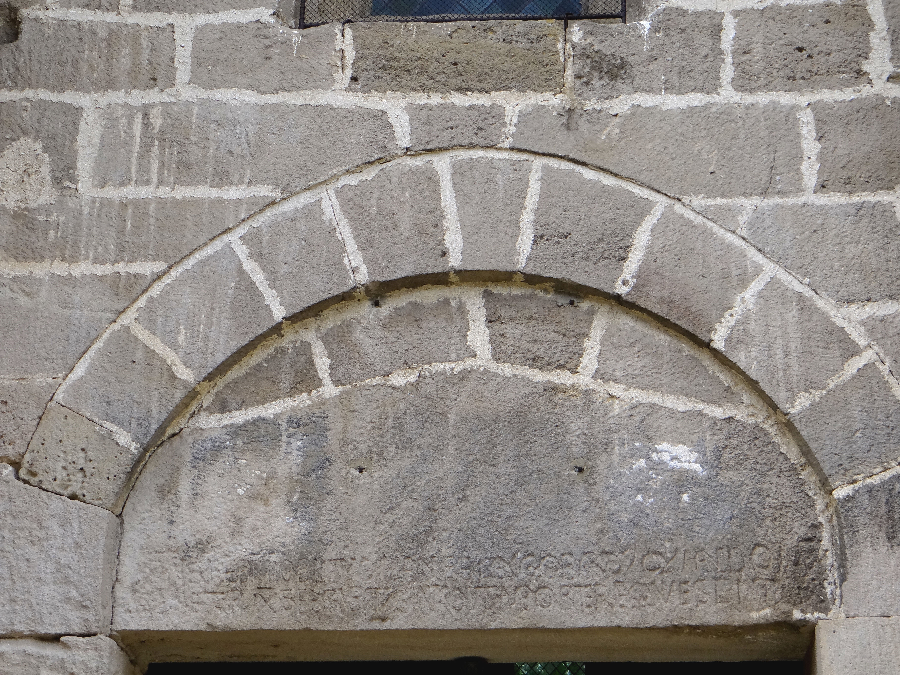 Castelnau-Pégayrols - Église Saint-Michel - Inscription au-dessus de l'entrée de l'église .